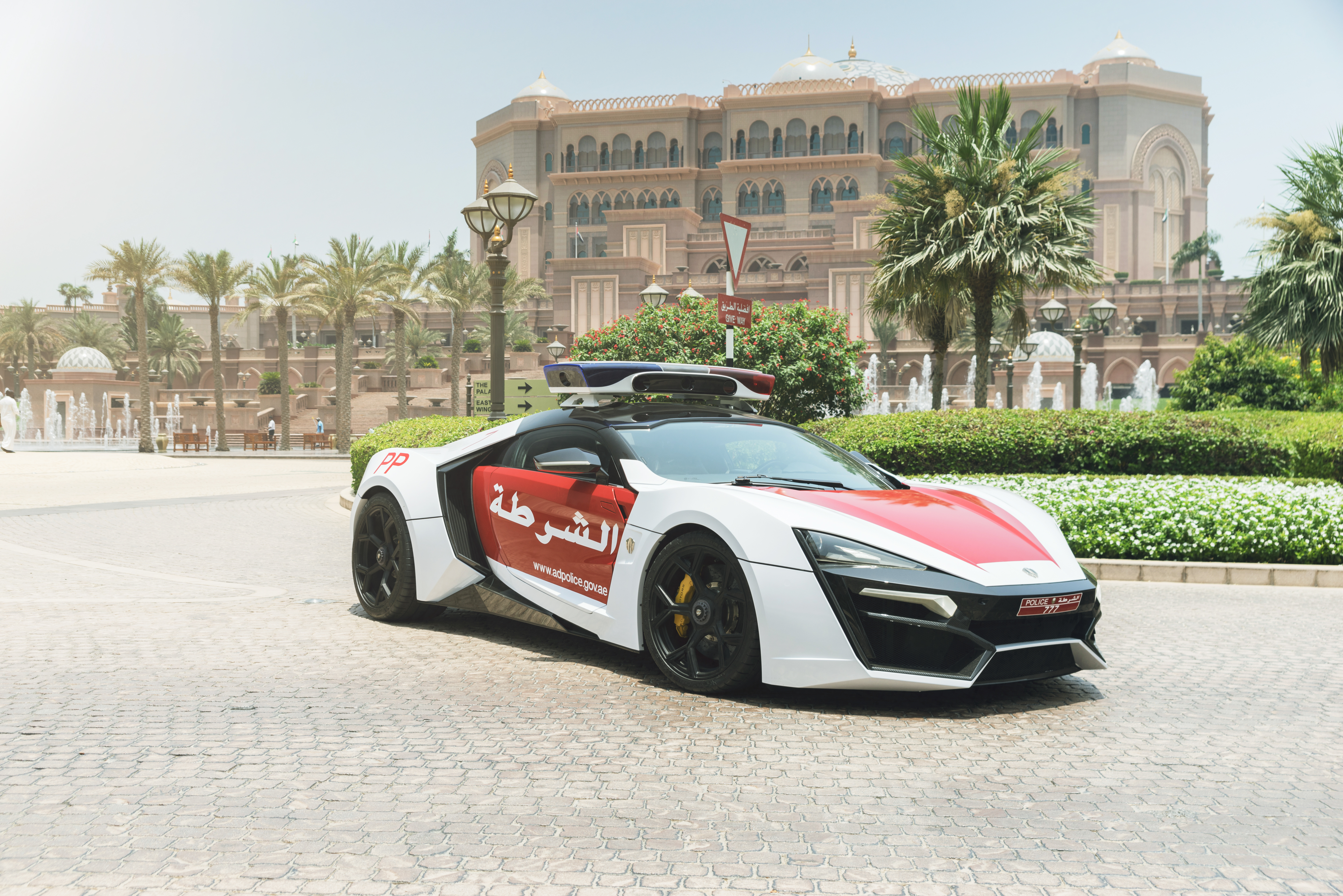 Abu Dhabi Police